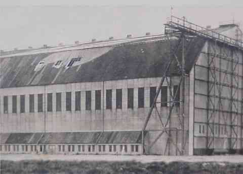 Toska-hallen med mindst 3 huller i taget